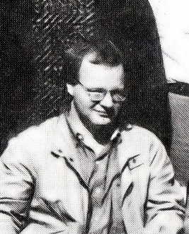 mm E.Schmittdiel, Polanica-Zdrój 1991